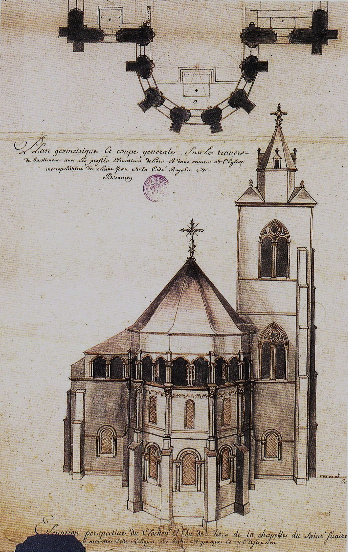 Dessin de l'abside orientale et du clocher nord de la cathédrale Saint-Jean de Besançon (Doubs, France). Réalisé en 1699 par Isaac de Robelin.